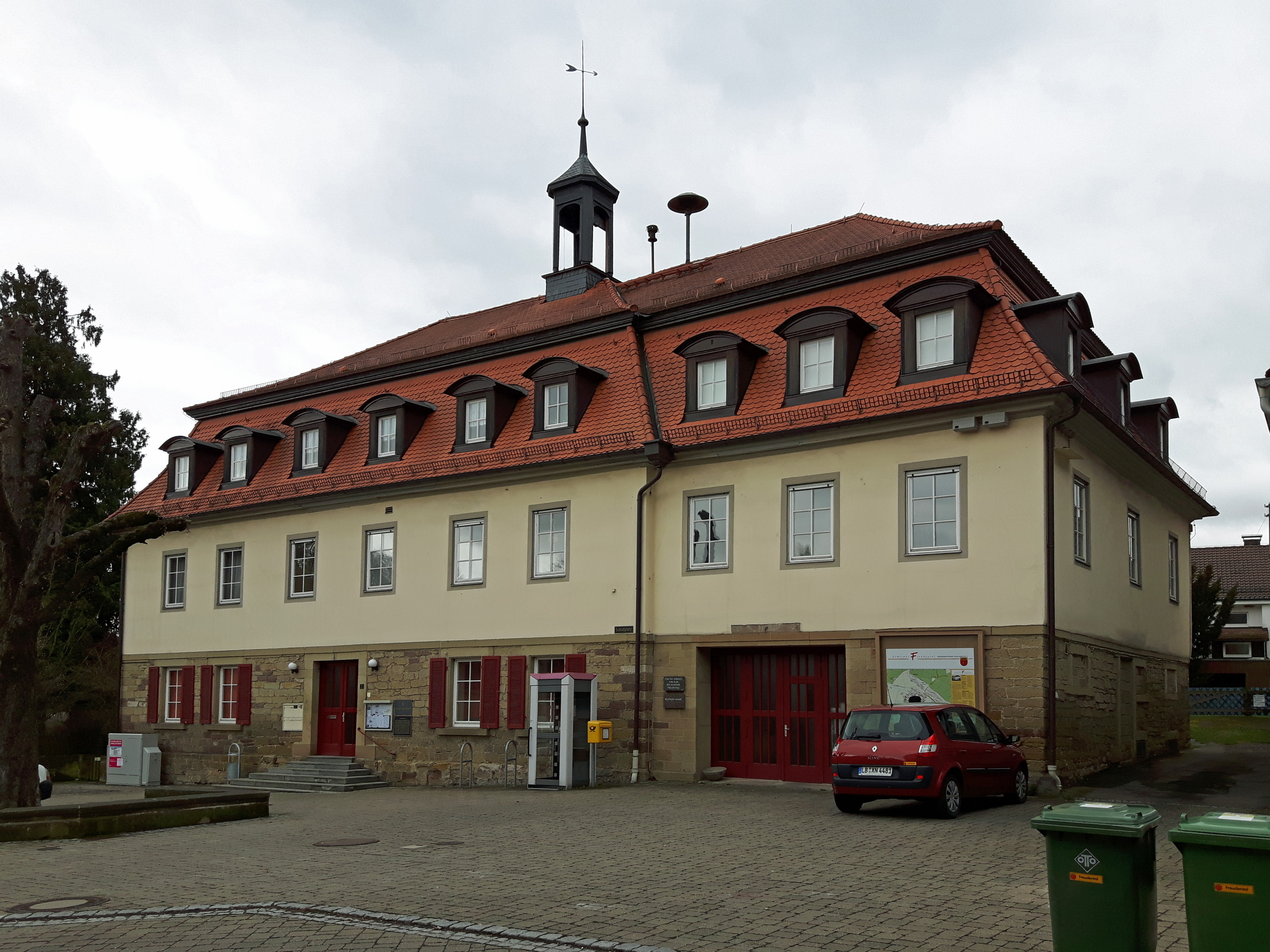 Rathaus in Freudental. In den Jahren 1810 bis 1811 durch König Friedrich von Württemberg als Teil der Schlossanlage erbaut.